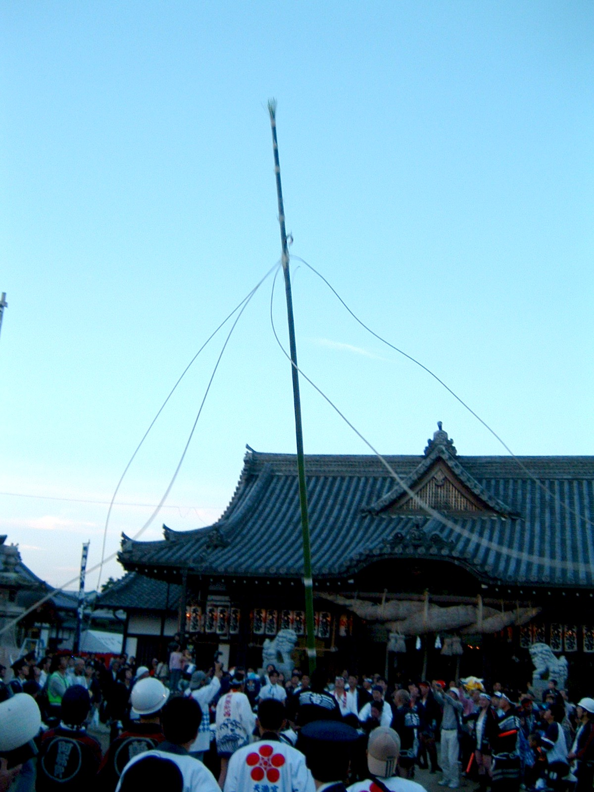 Sone-tenmangu autumn festival